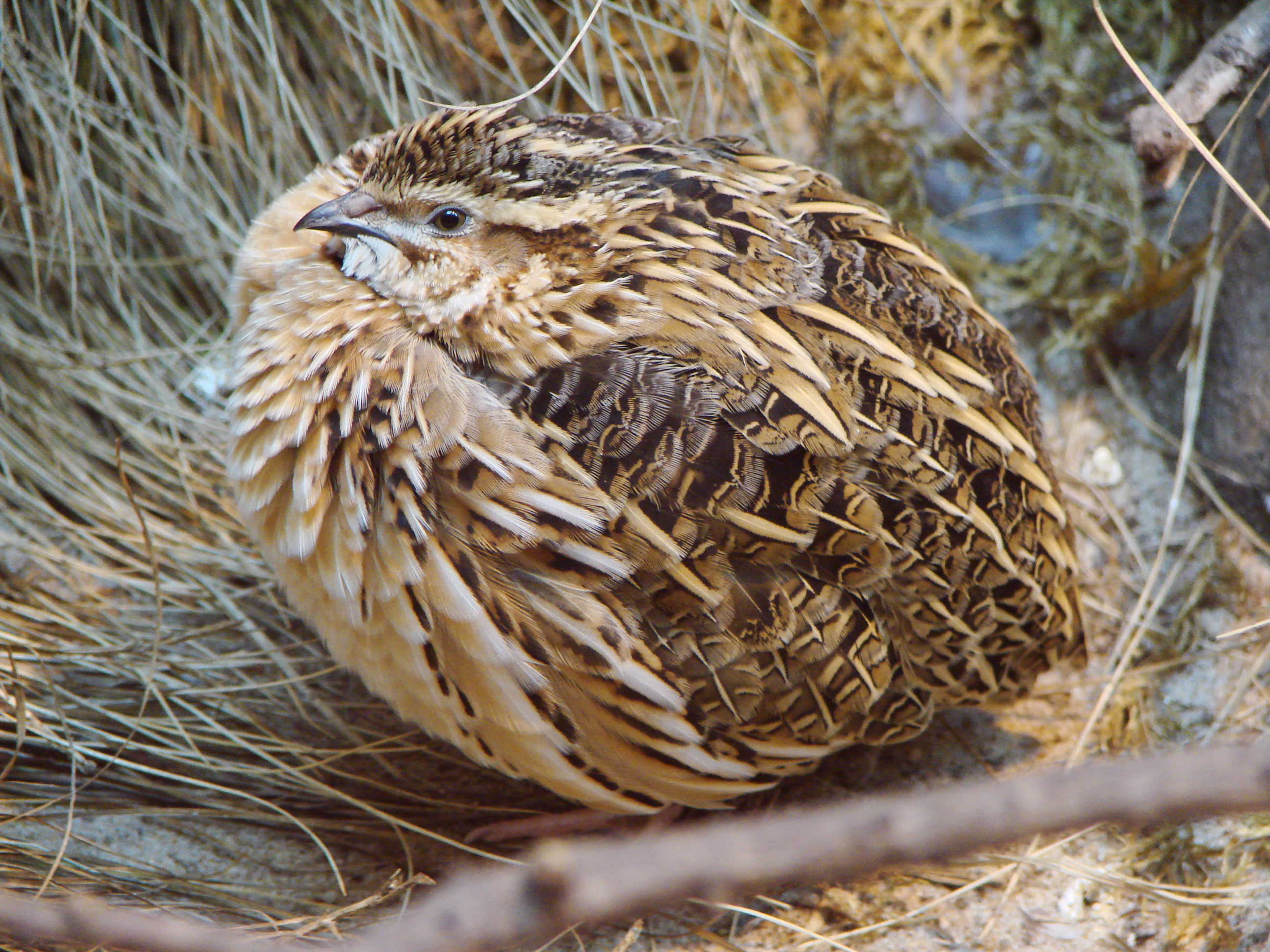 Warsaw Zoo (Polska/Poland/Pologne/Polen) : Coturnix coturnix L. (1758)